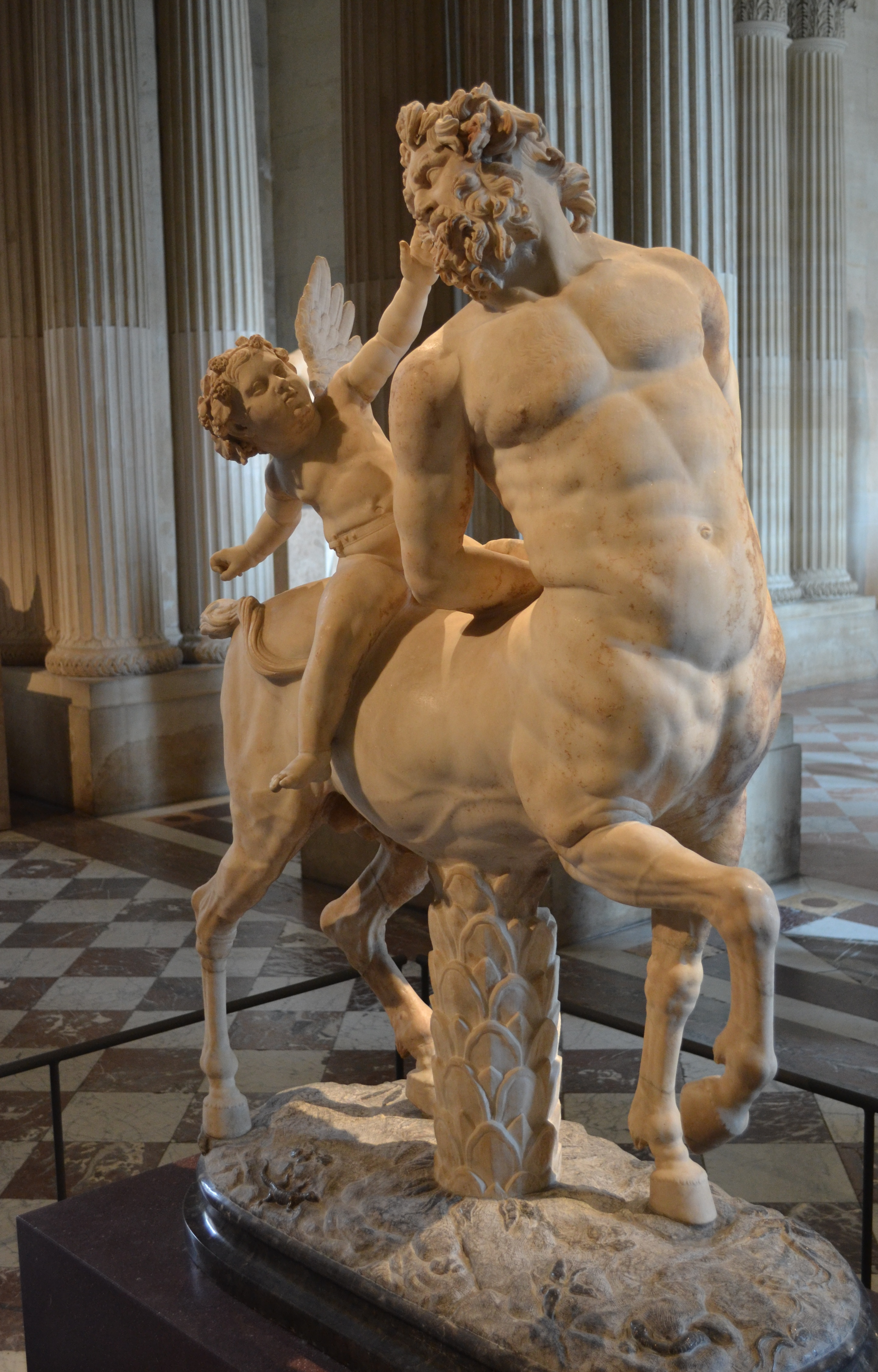 Centaure chevauché par l'amour. Copie romaine d'époque impériale d'un original grec du IIe siècle av. J.-C.